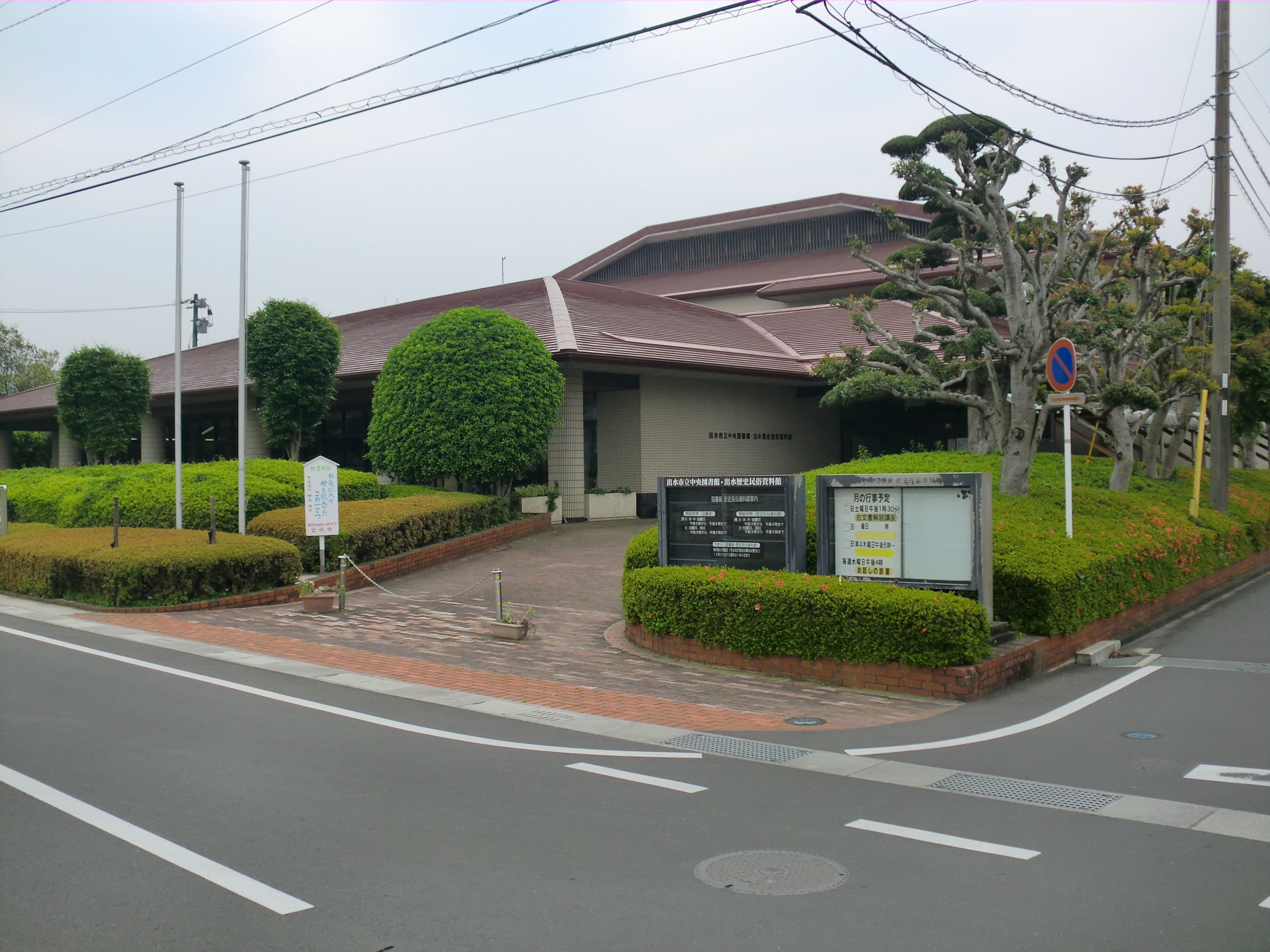 鹿児島県出水市にある出水市立図書館・出水市立歴史博物館